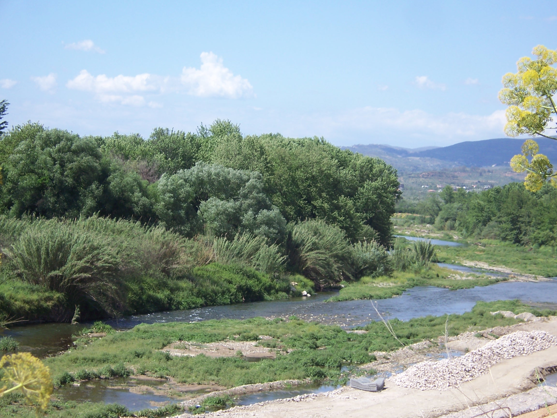 Rivière Eurotas, quelques kilomètres en aval de Mistra